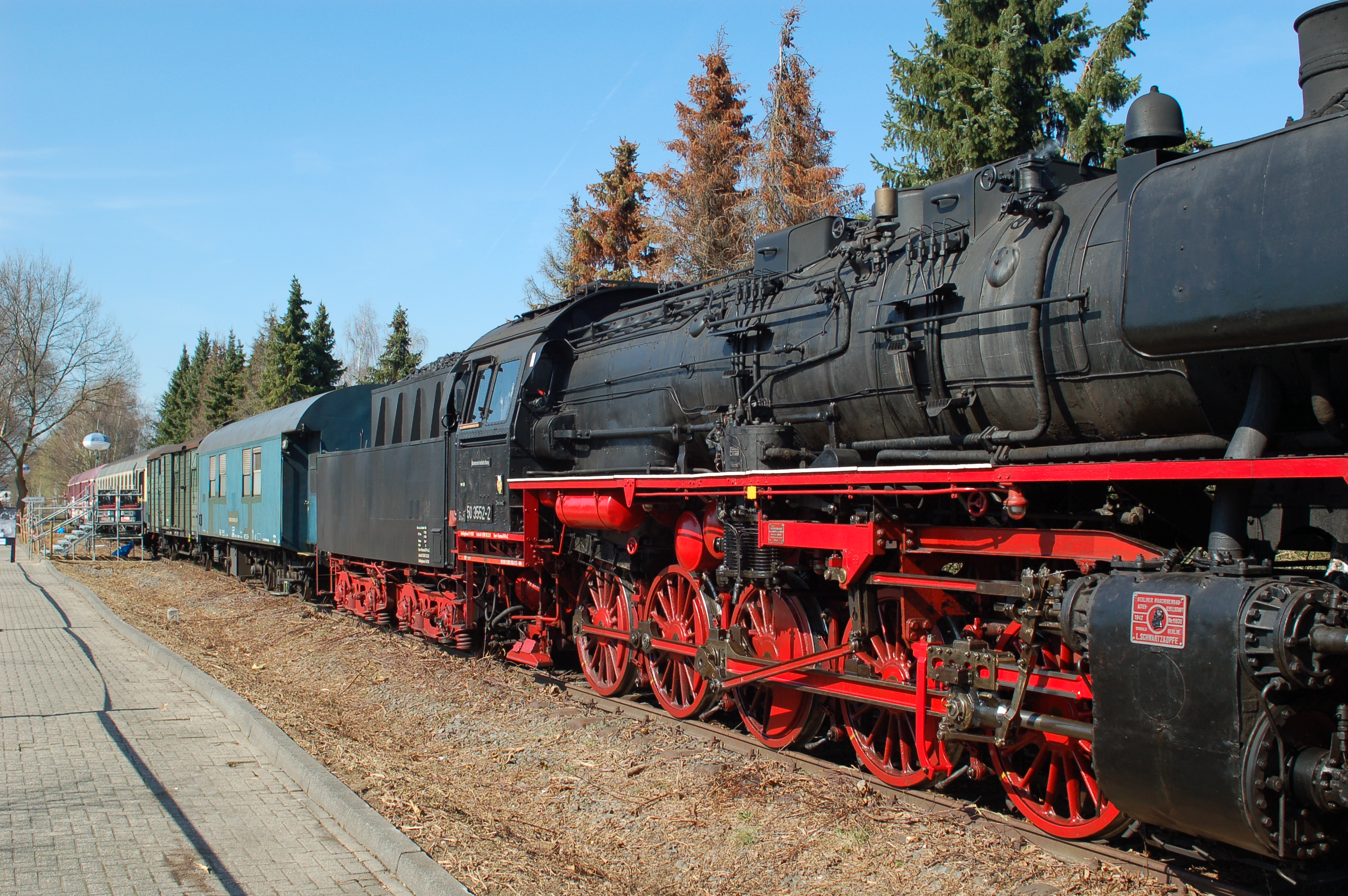 Der Zug der Erinnerung in Heinsberg, abgestellt neben dem Parkplatz der Kreisverwaltung auf der Bahnstrecke Lindern - Heinsberg.